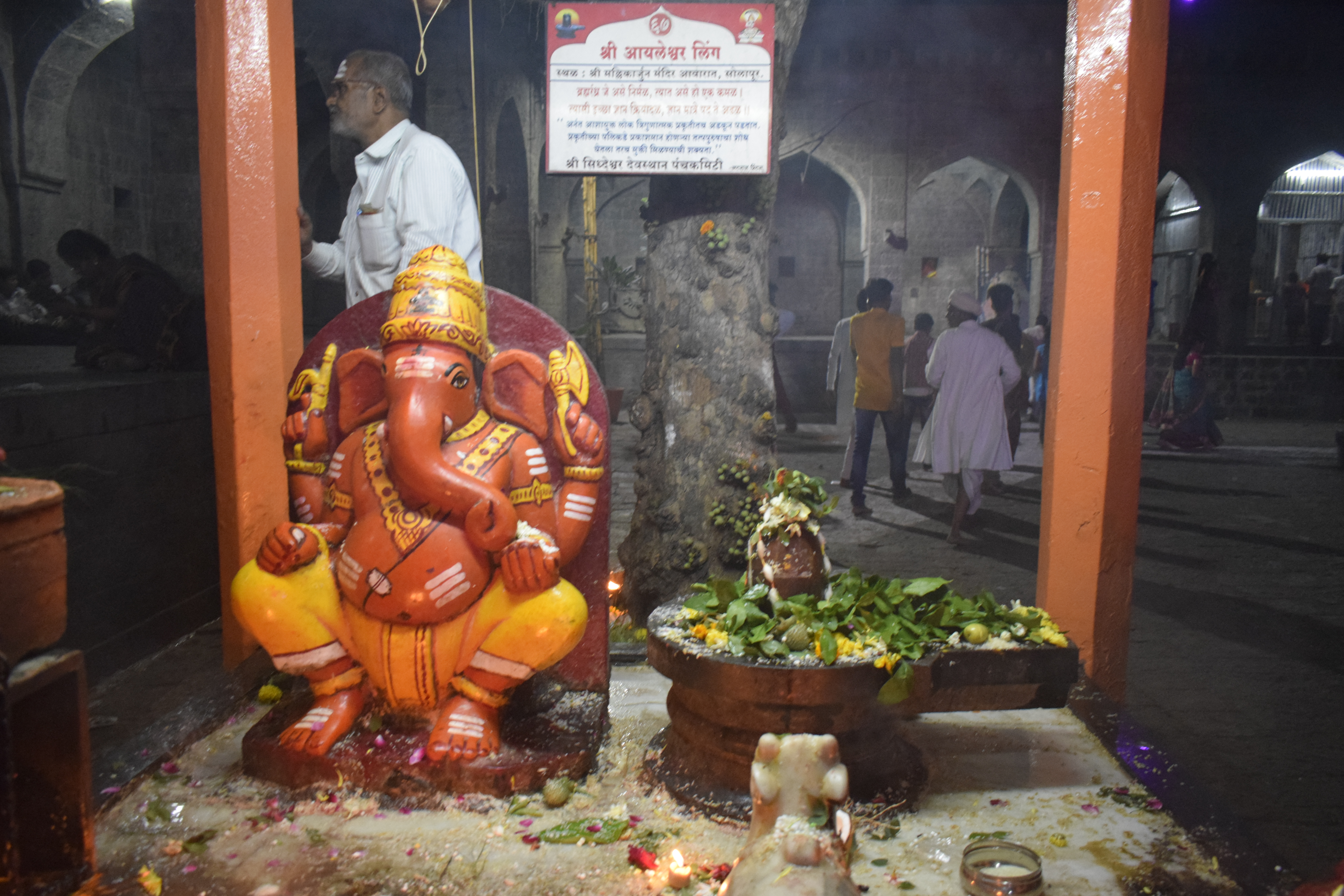 श्री आयलेश्वर लिंग